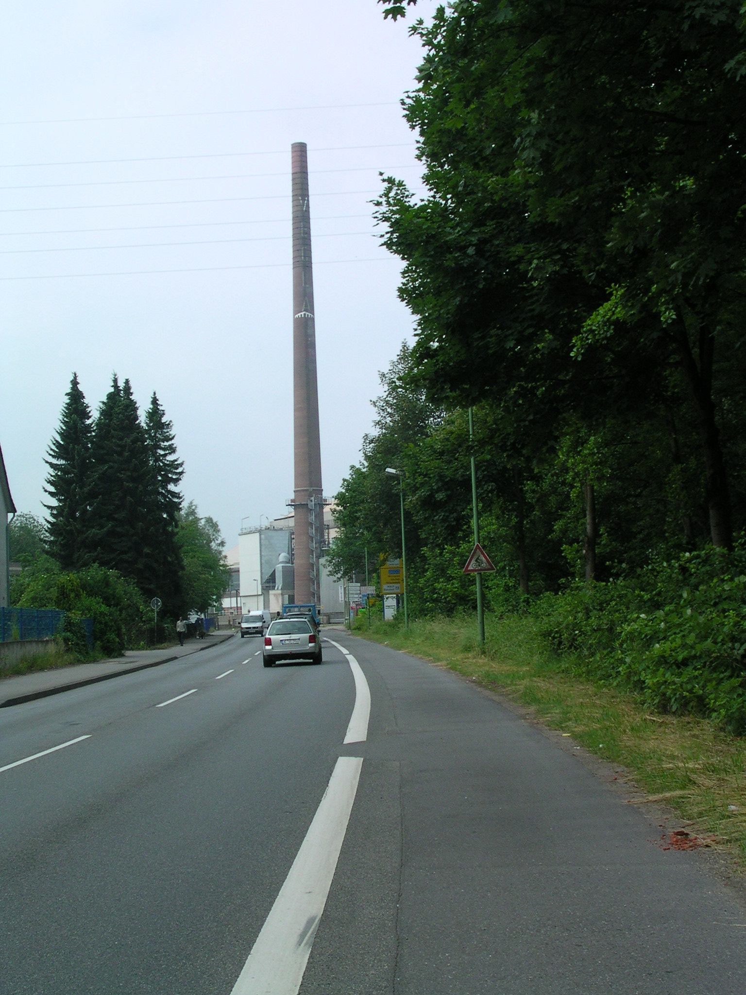 Stolberg, Kamin der Vereinigten Glaswerke (Aufschrift VEGLA, nicht Saint Gobain) an der Eschweiler Straße